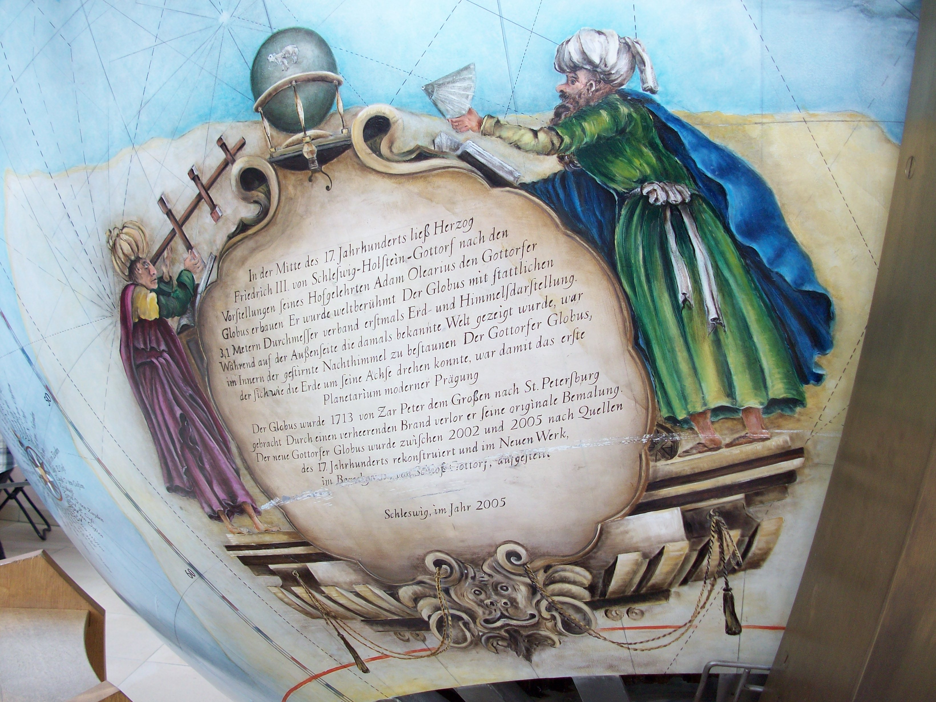 "Quellensignatur" und Erklärung der Restaurierung am Gottorfer Riesenglobus